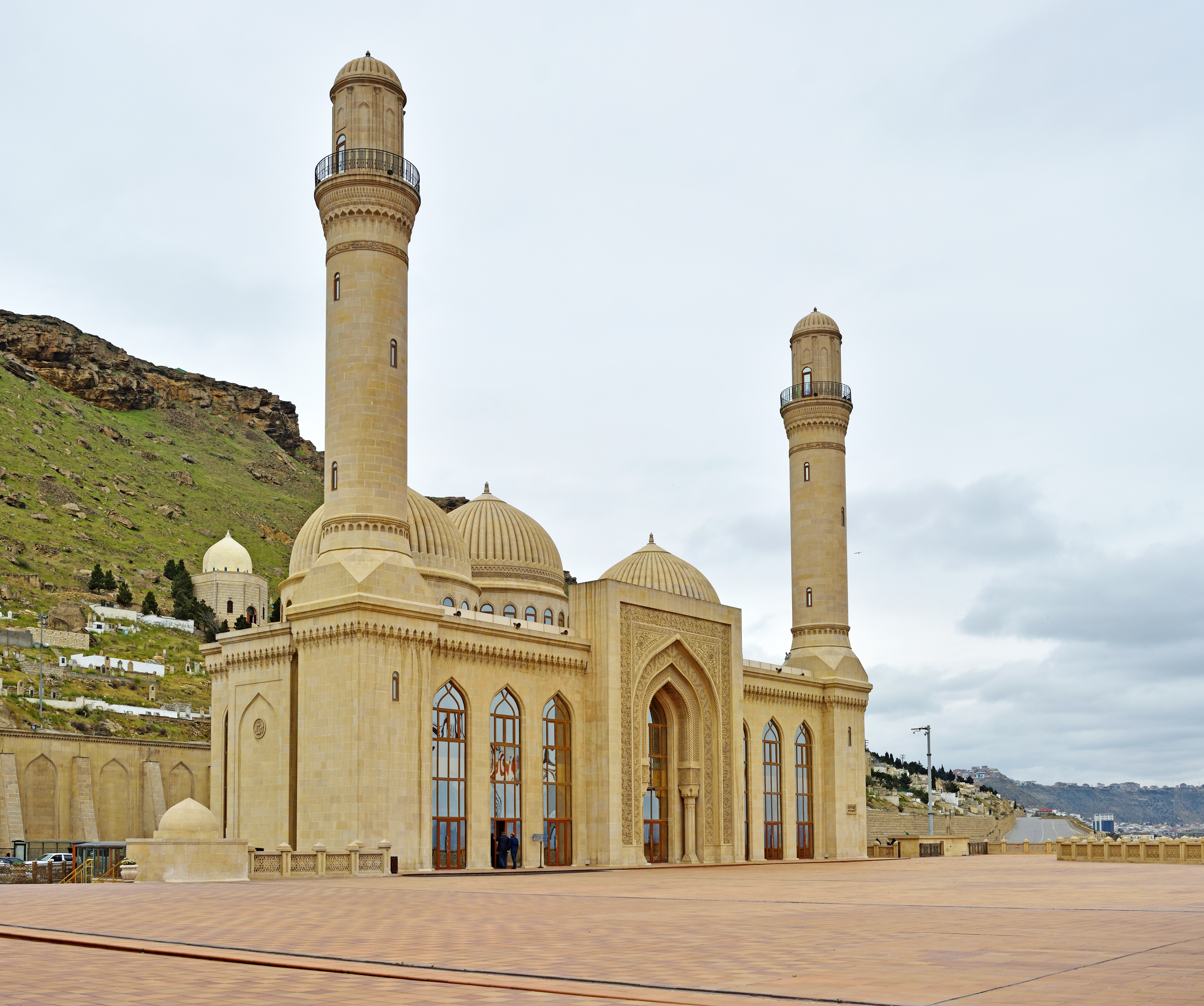 Bibi-Eybat mosque, Baku, Azerbaijan